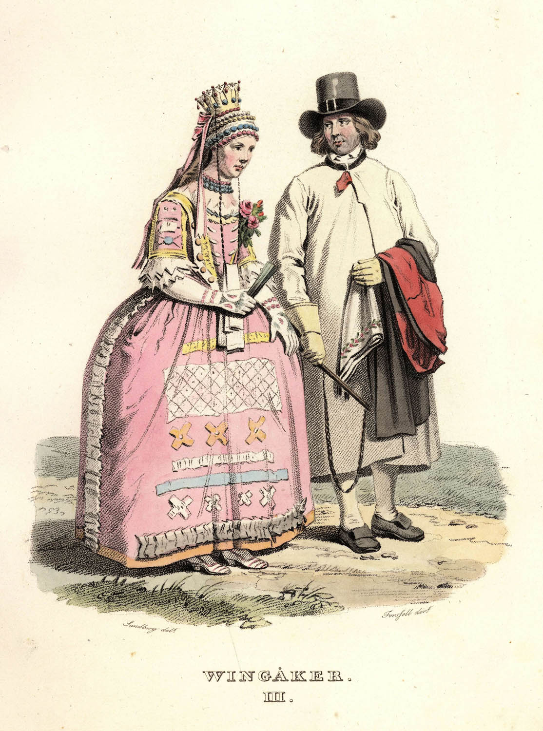 Man och kvinna i bröllopskläder från Vingåker, Södermanland. "Sandberg / Forssell". Bild föreställande par i Vingåkersdräkt ur planschverket "Ett år i Sverige" (1827-35) av Johan Gustaf Sandberg och Christian Didrik Forssell.